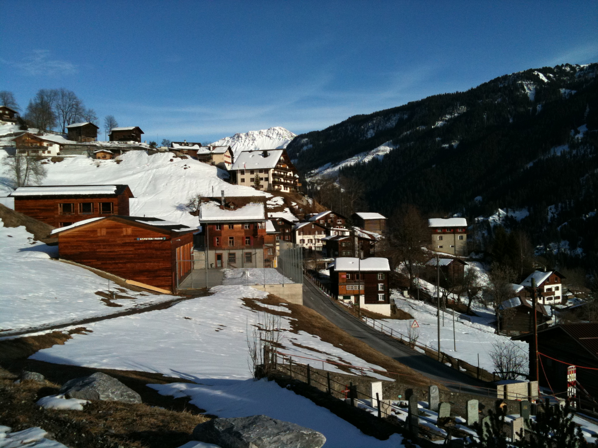 St. Peter im Schanfigg, Kanton Graubünden